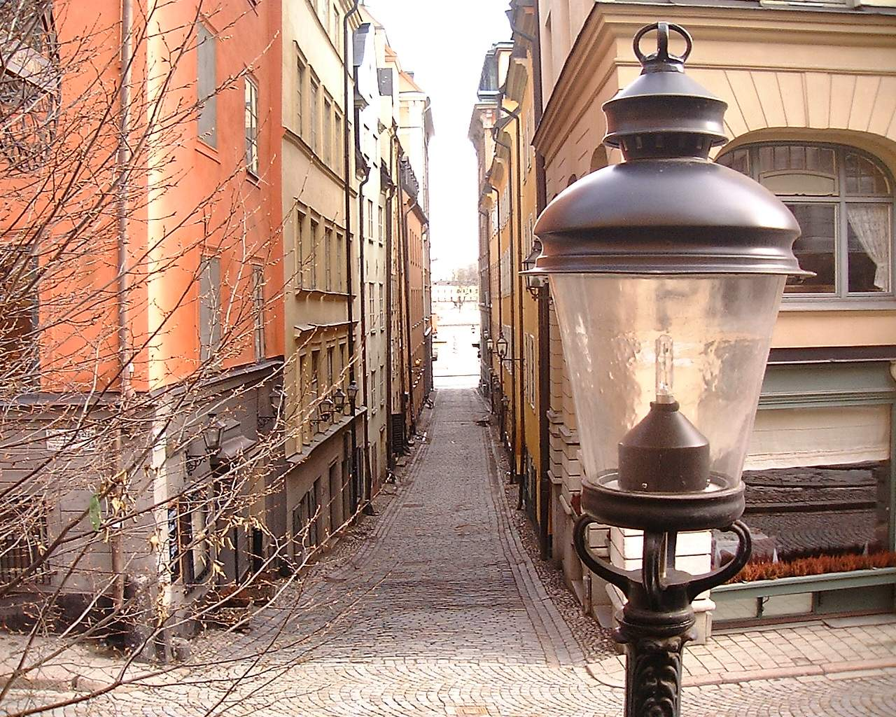 Nygränd, Gamla stan, Stockholm.